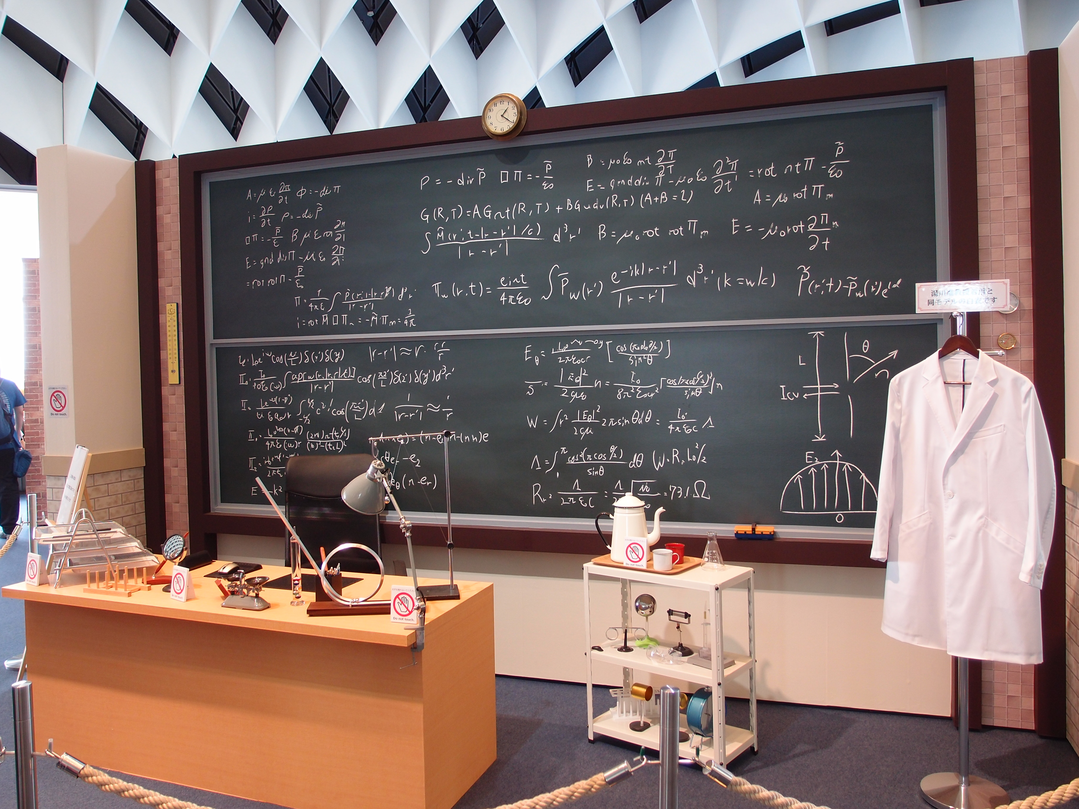 真夏の方程式